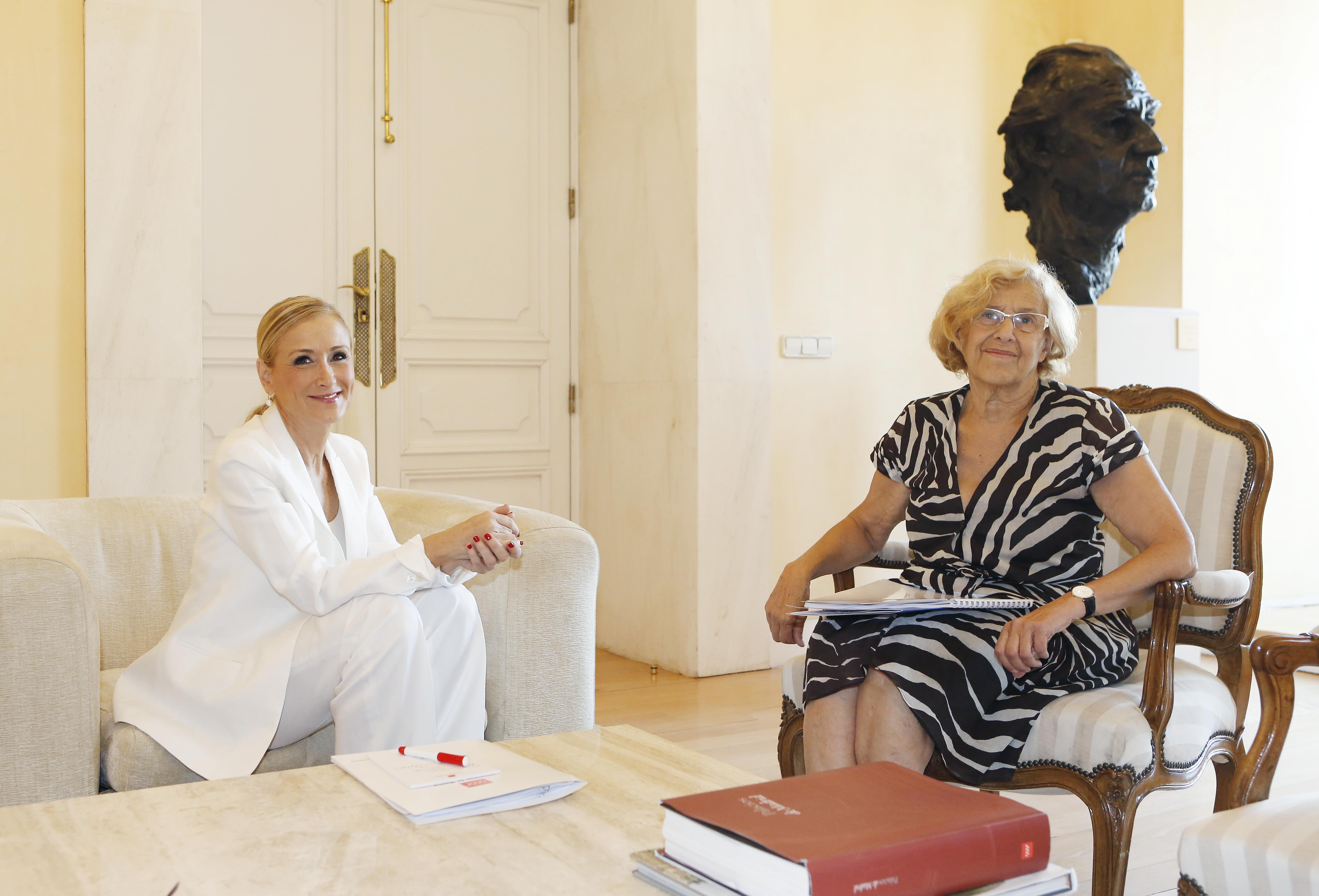 Manuela Carmena et Cristina Cifuentes